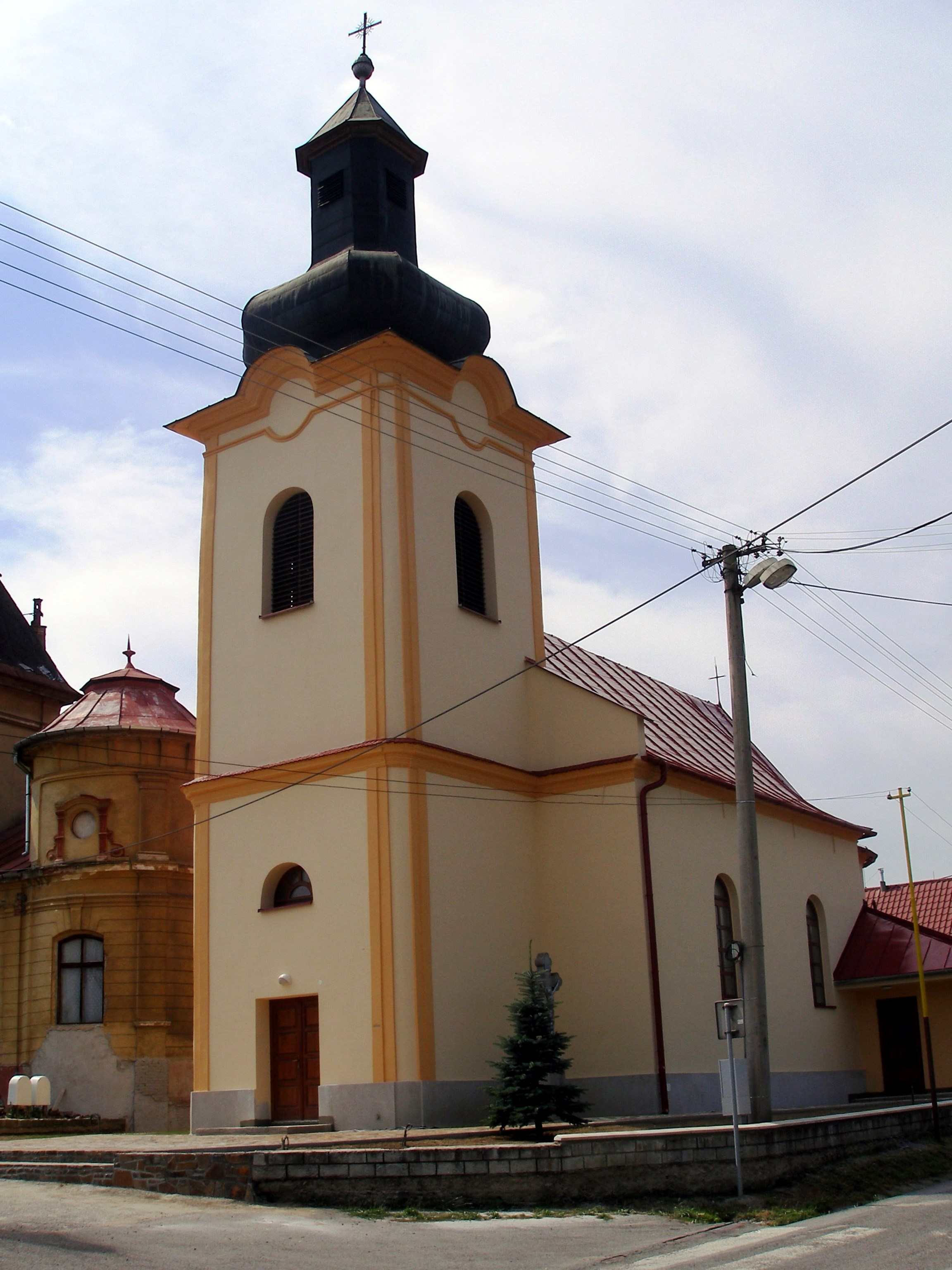 Kostol Povýšenia sv.Kríža v obci Uzovce okres Sabinov, región Šariš